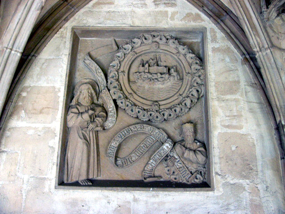 Relief im Kreuzgang des Klosters Himmelkron